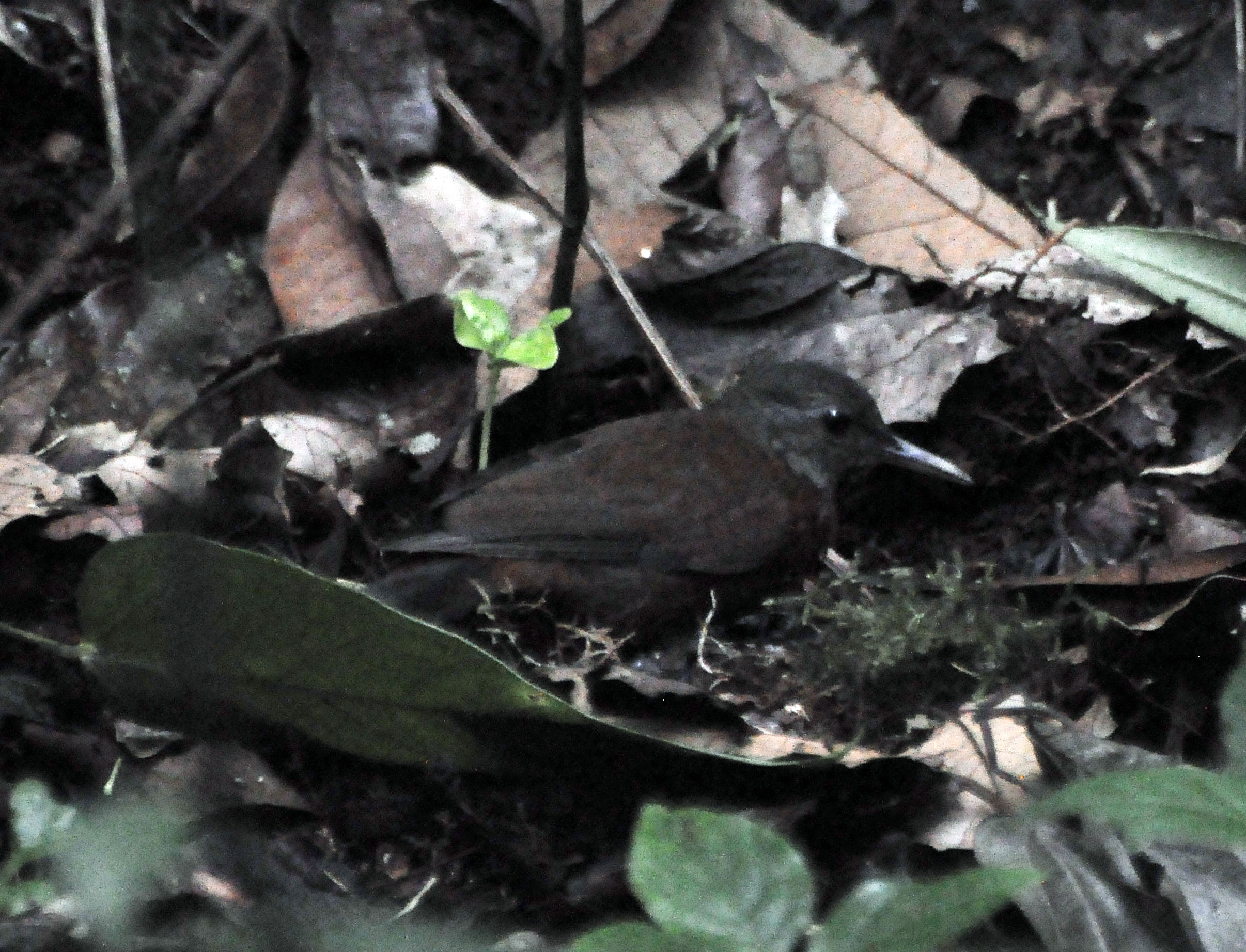 Sclerurus albigularis canigularis 31 mar 12 Cloud Forest Preserve, Costa Rica